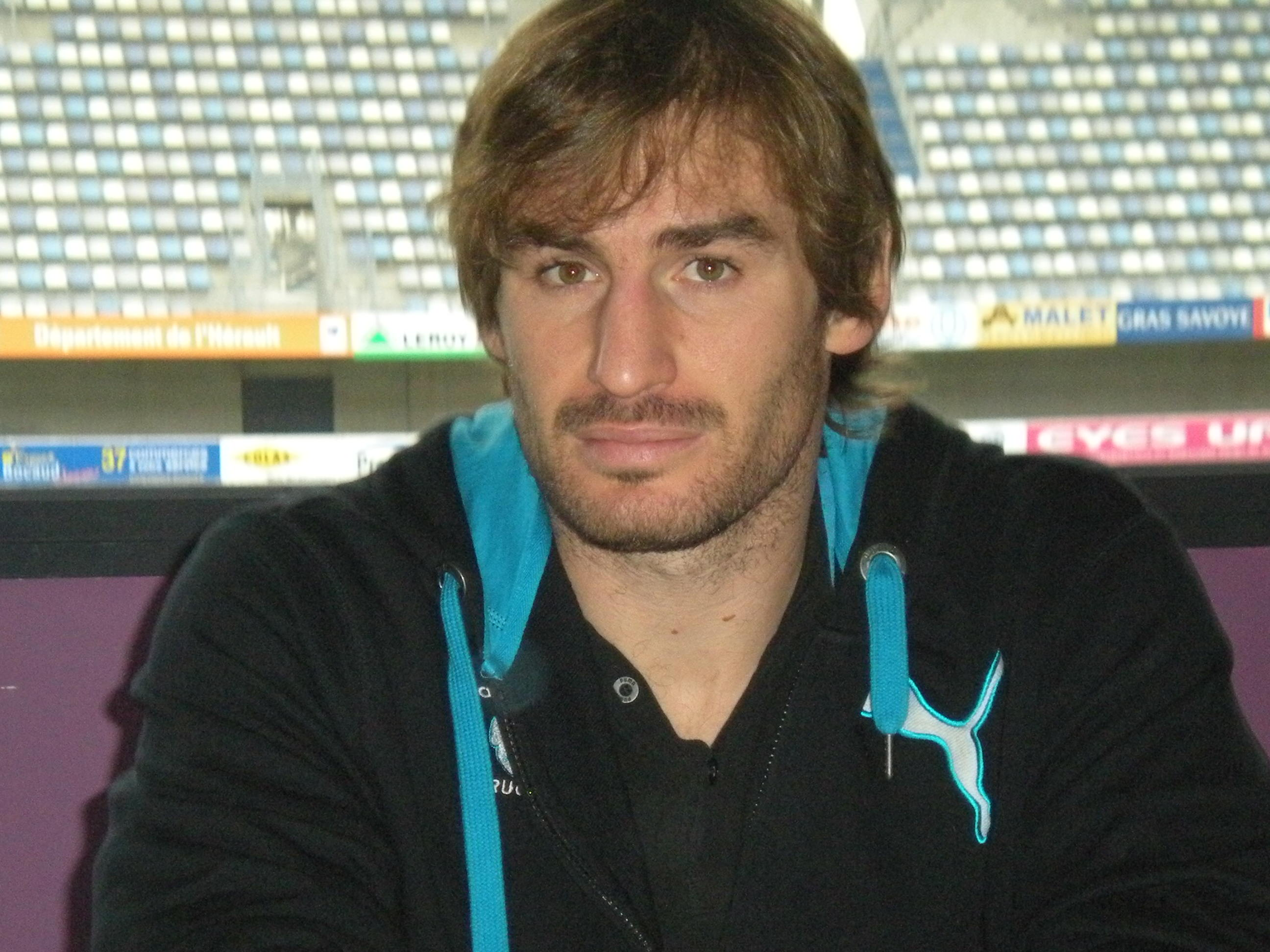 Séance de dédicaces, Noël 2012 de l'école de rugby : Mickaël Ladhuie.